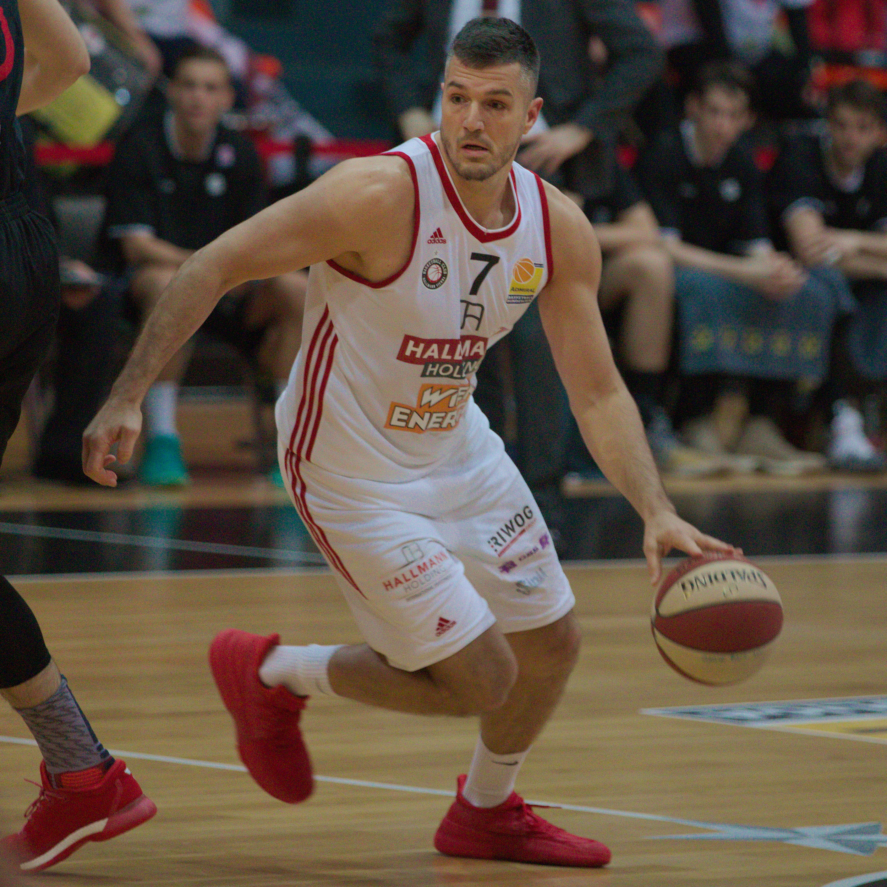 Stjepan Stazic, Spieler des BC Vienna, während des Basketball-Bundesligaspiels gegen die Raiffeisen Flyers Wels, 21. Jänner 2018